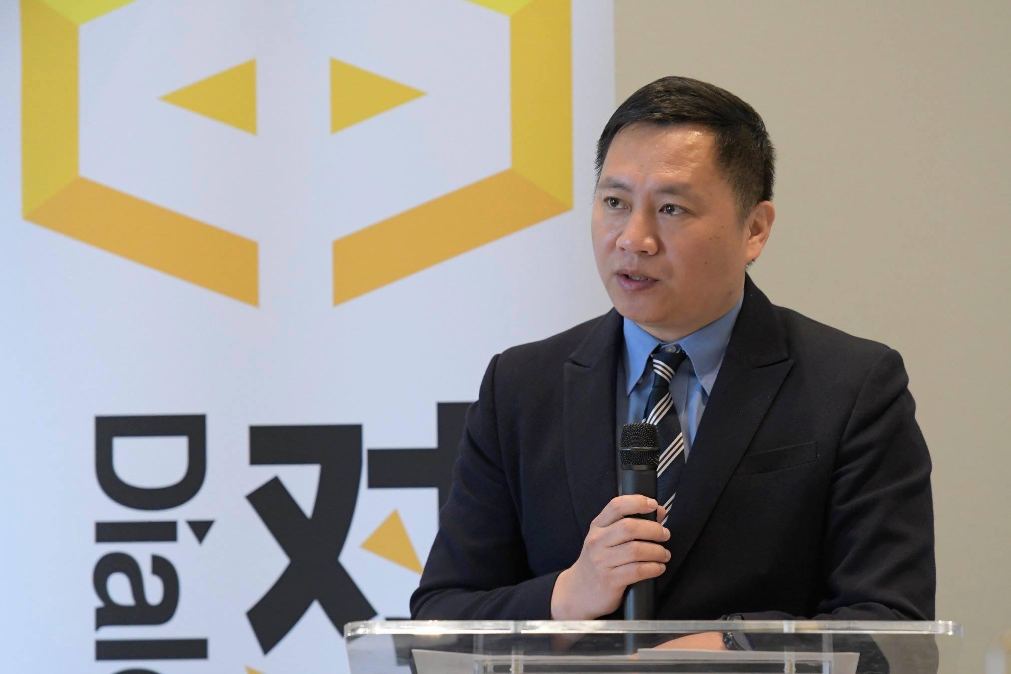 다이얼로그차이나 왕단소장